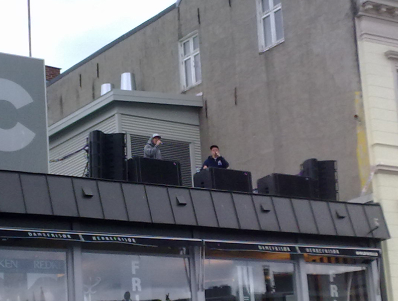 Norsk (bokmål): De norske rapperne Jaa9 & OnklP på taket av McDonalds i Arendal